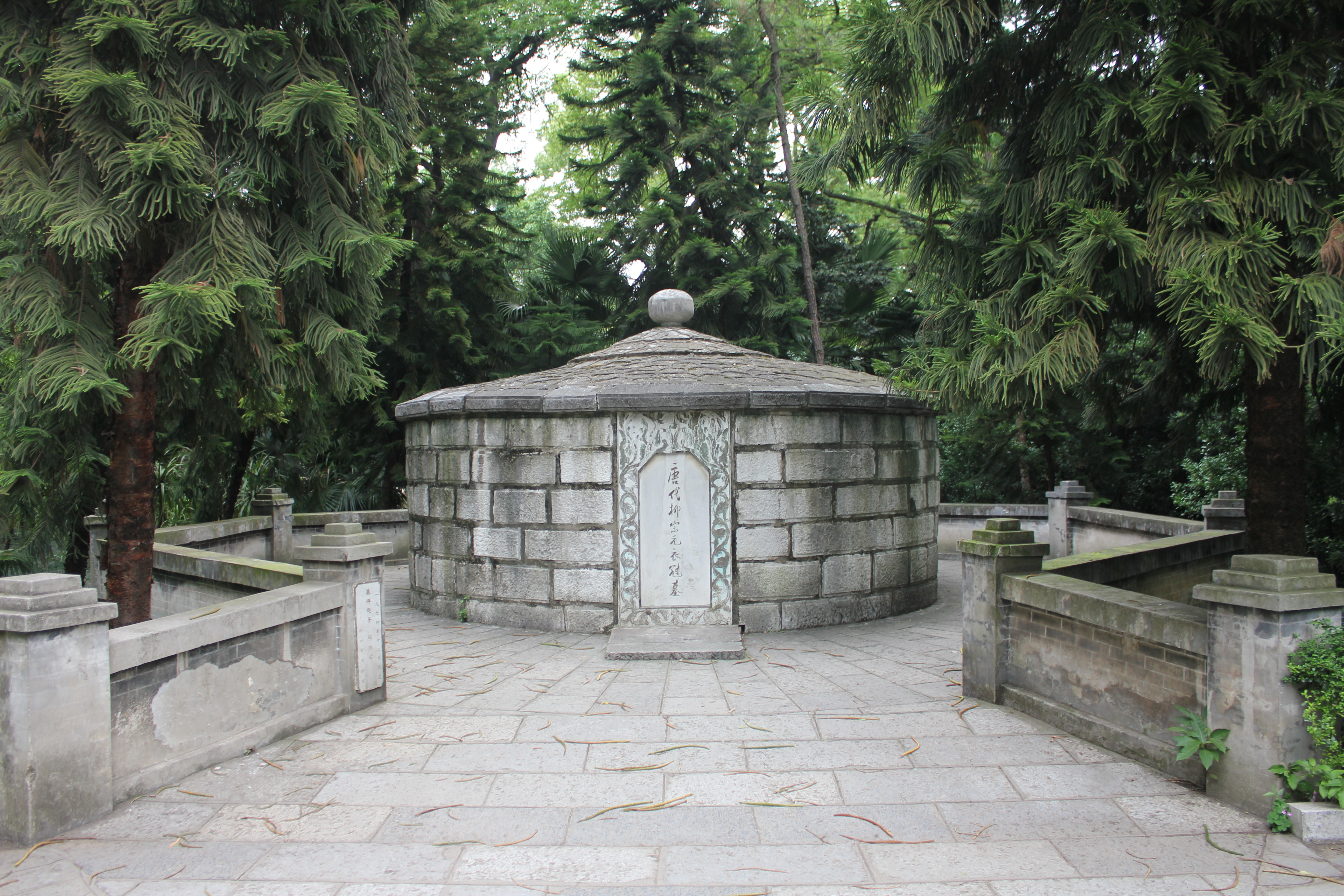 唐代柳宗元衣冠墓，墓碑为郭沫若题字。